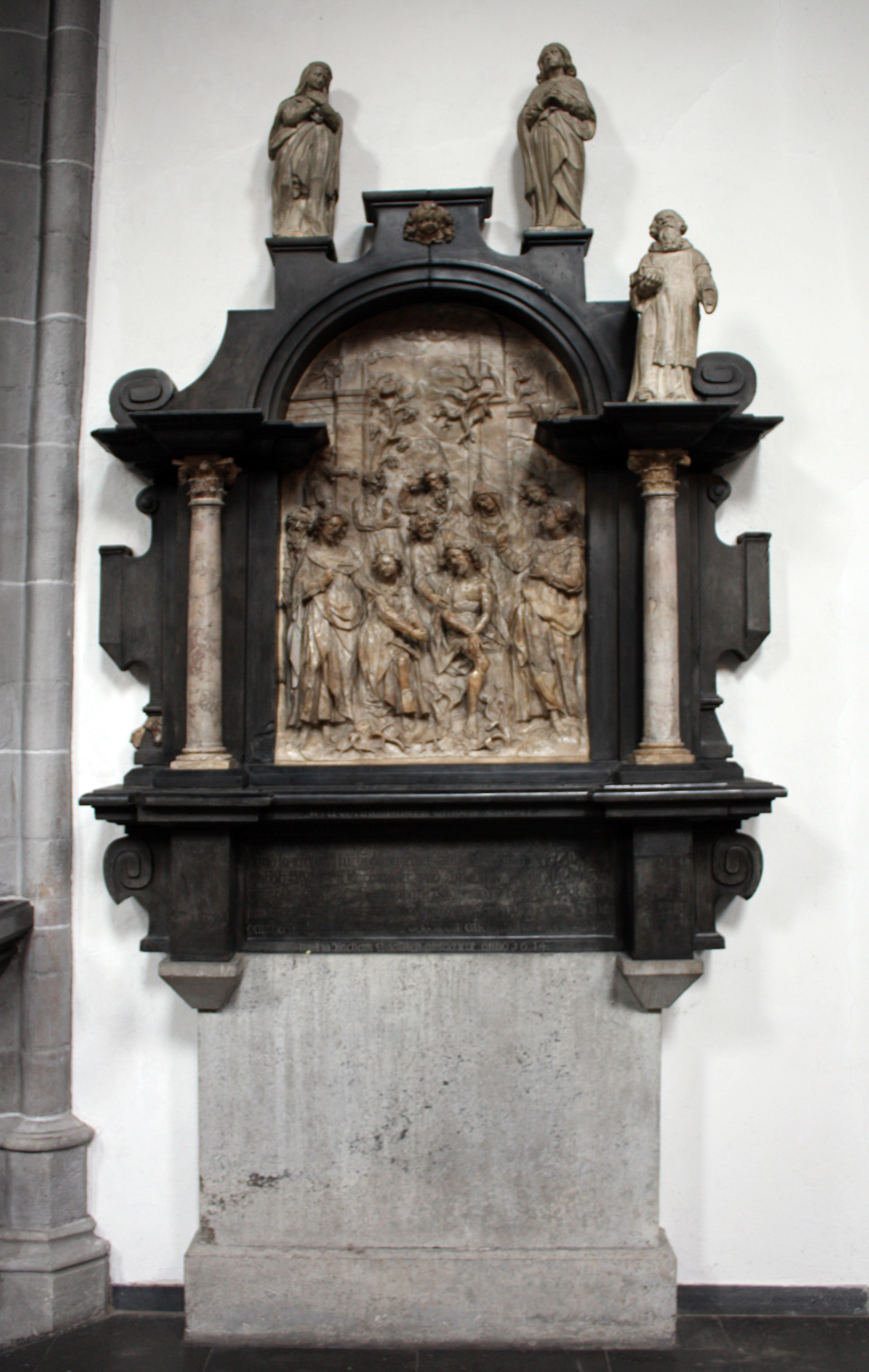 St. Maria Nagdalena Köln. Ein als Epitaph „Deutzmann“ bezeichneter Memorienaltar aus Marmor (1614)